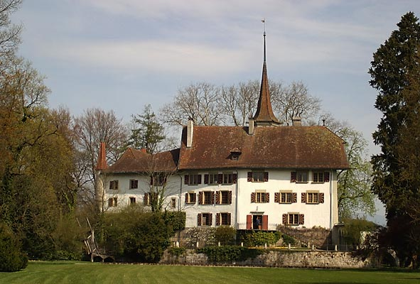 Façade du château de Landshut à Utzenstorf (BE) en Suisse